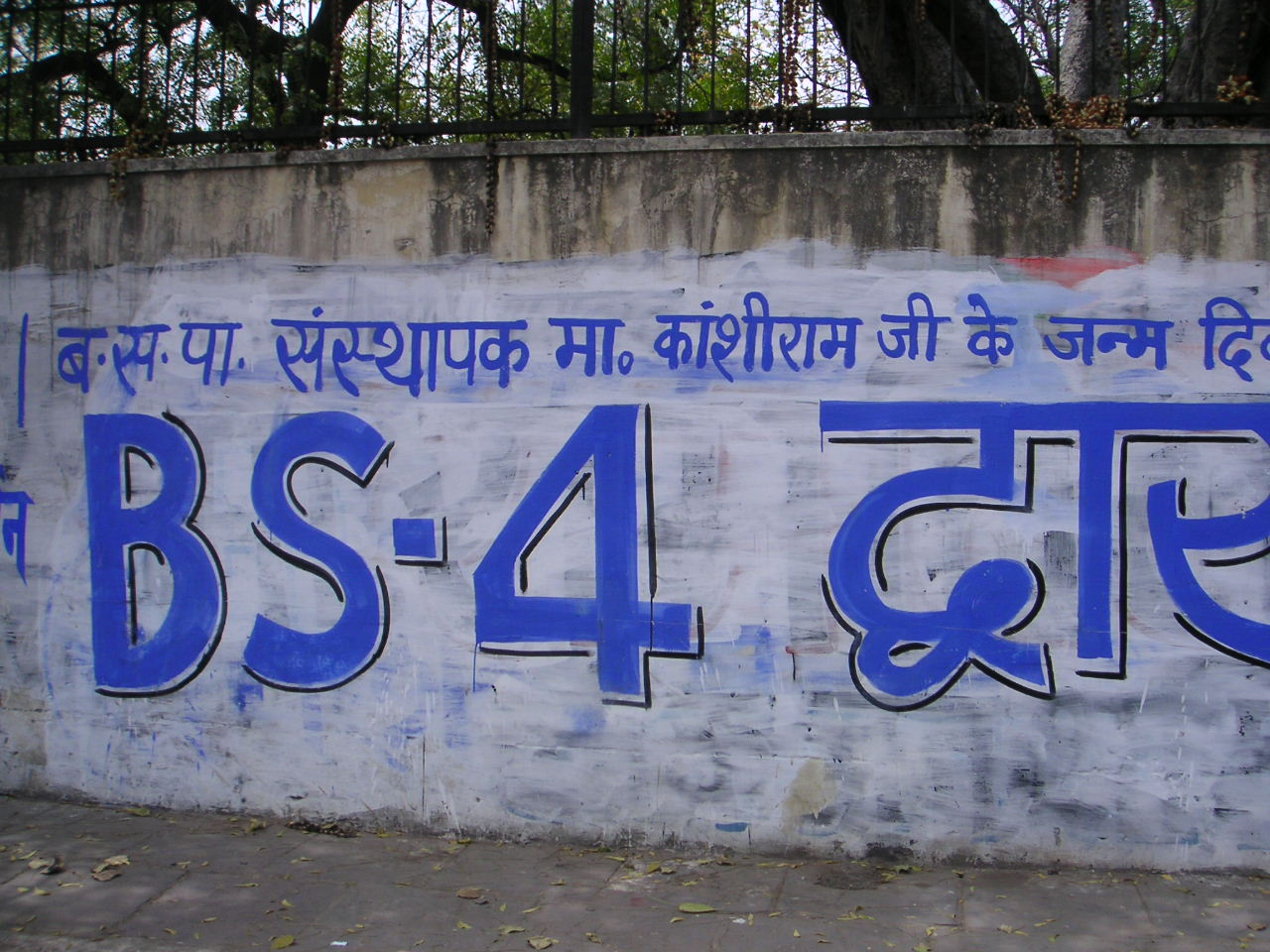 Bahujan Soshit Samaj Sangharsha Samiti (BS-4) mural in Delhi, saluting Bahujan Samaj Party leader Kansiram on his birthday. Photo: Soman